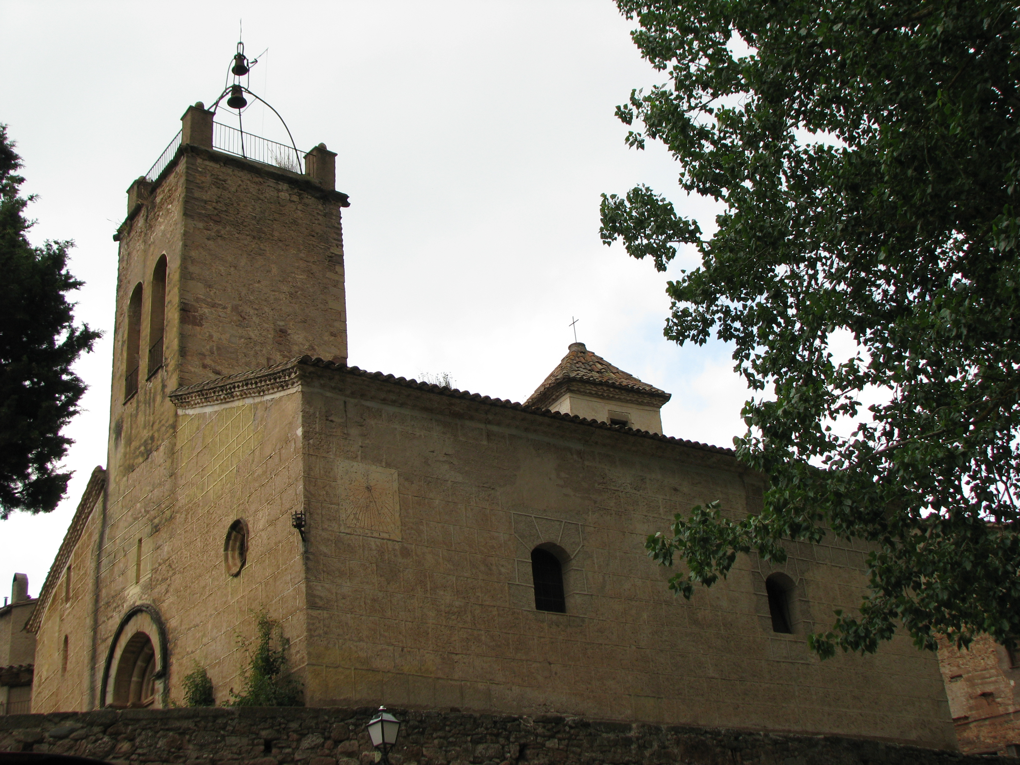 Vista interior del pueblo. Objeto de la foto: la iglésia de Sant Martí.